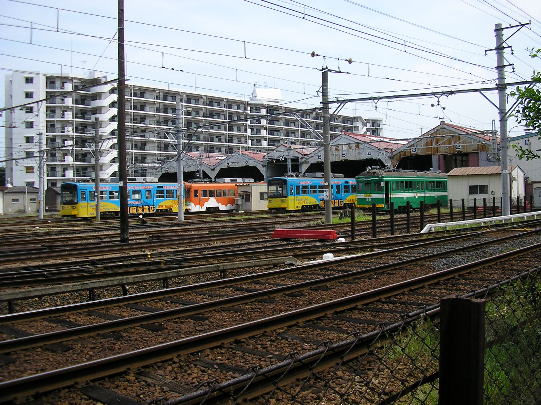 2006年8月に投稿者撮影 我孫子道駅